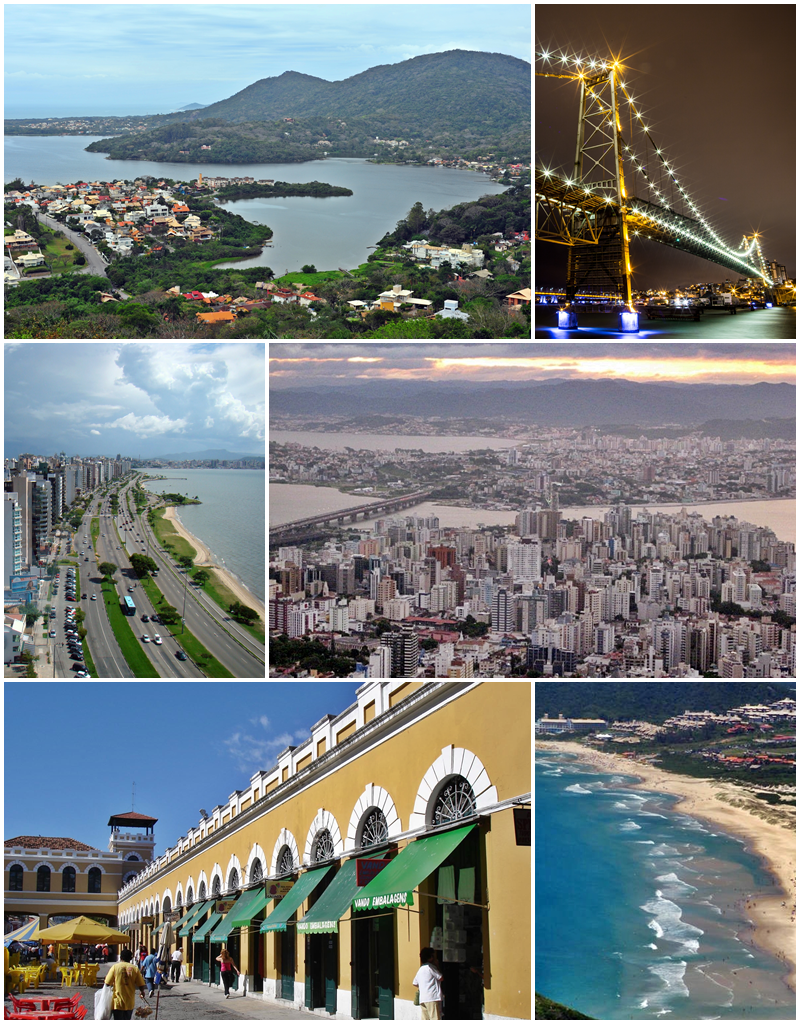 Montagem de Florianópolis